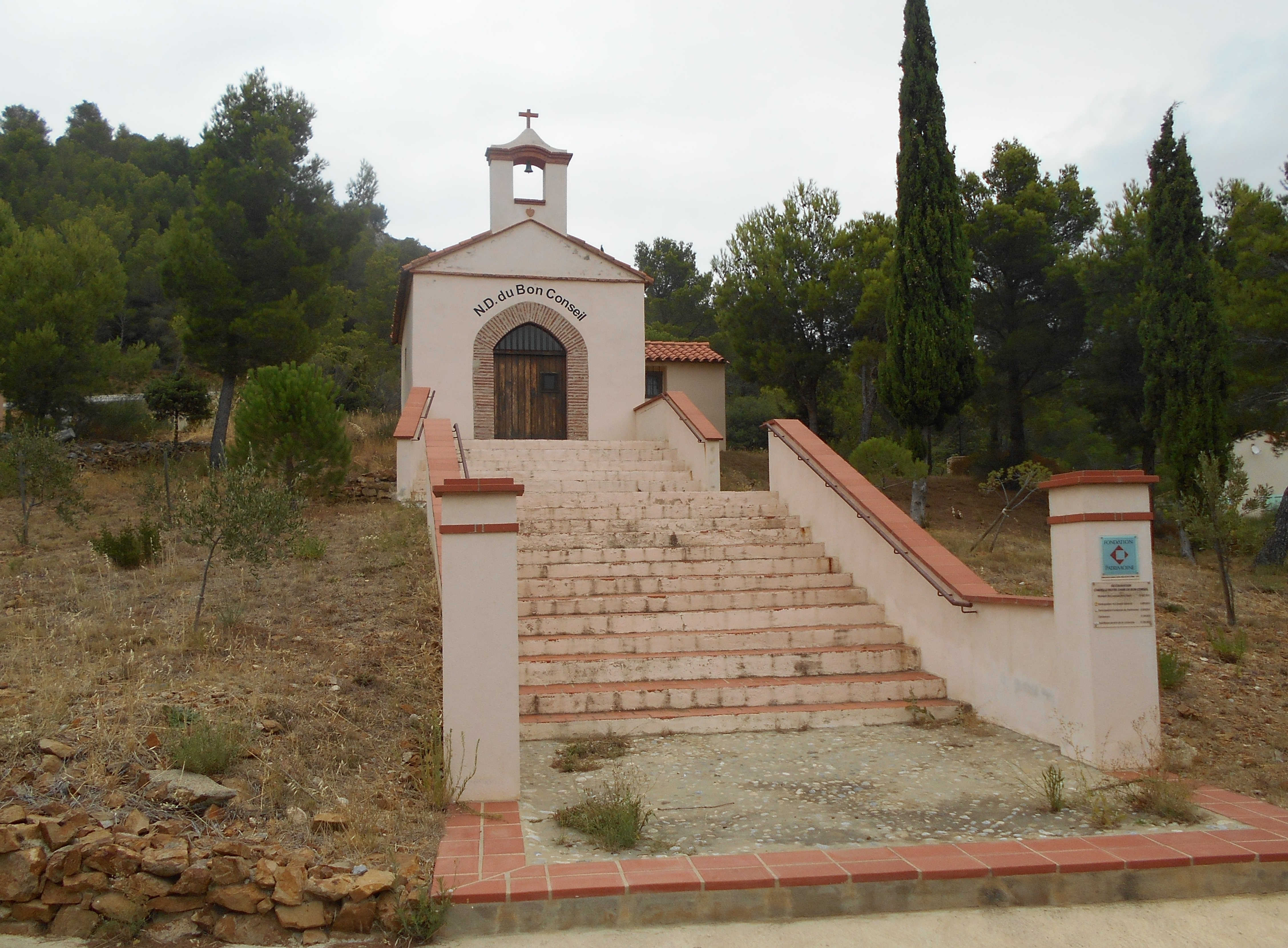 Façana de la Mare de Déu del Bonconsell